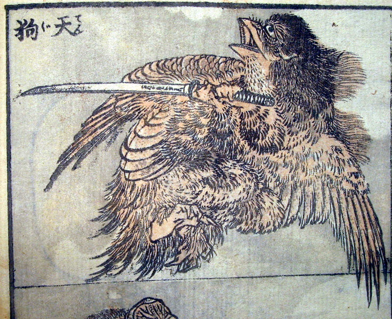 Hokusai, drawing of a tengu.